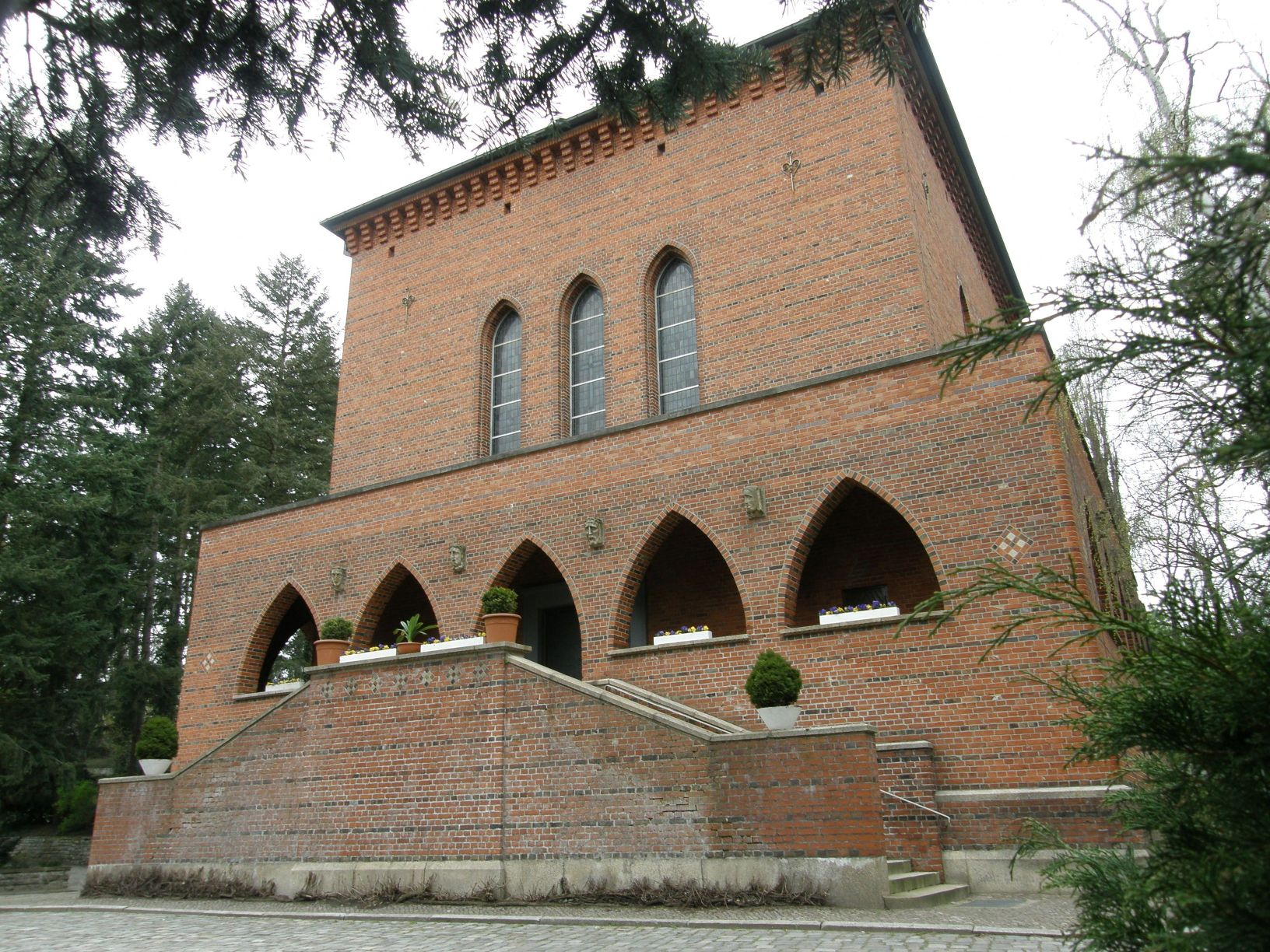 Trauerhalle des Friedhofs Heerstraße. Trakehner Allee 1, Berlin-Westend.